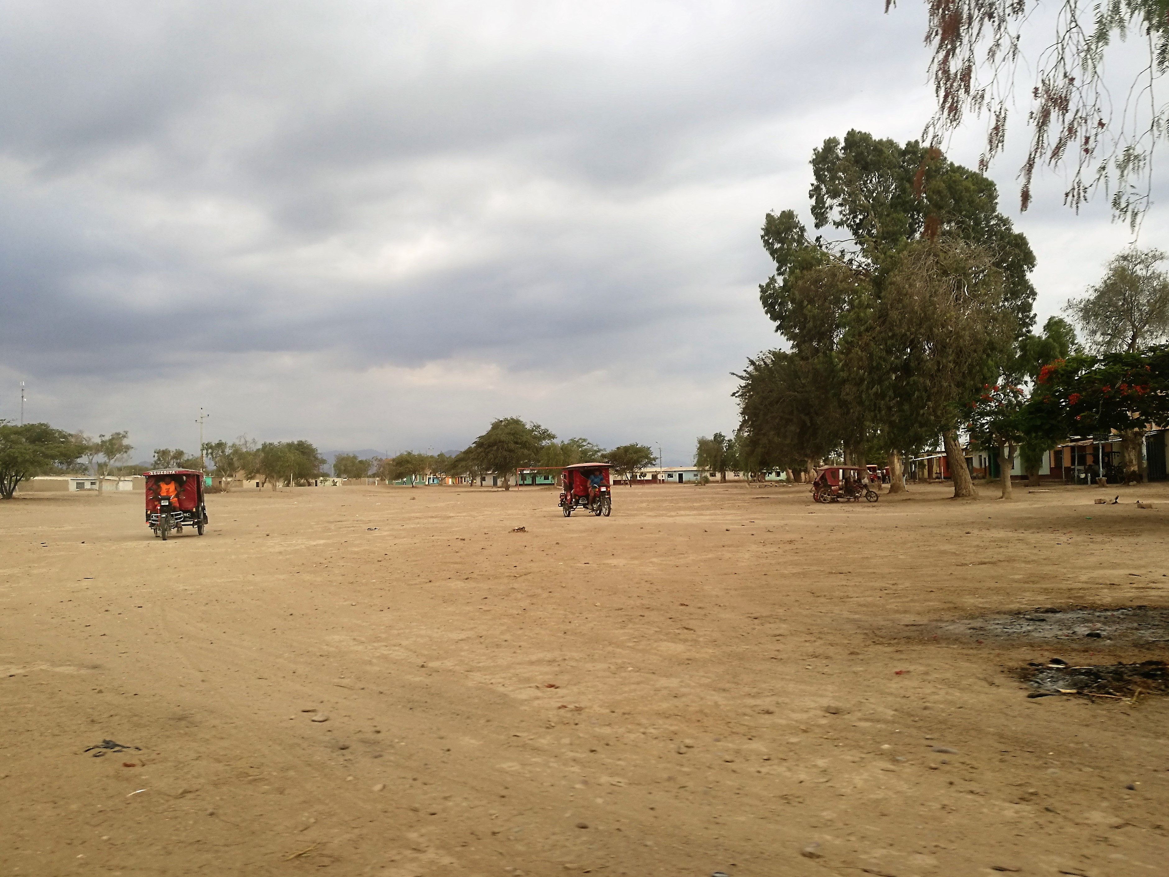 Plaça de Capote